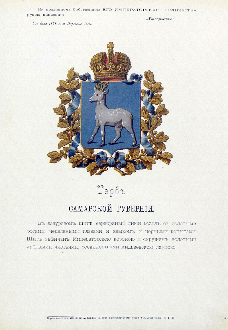 Official Russian Empire coat of arms Samara Governorate. Герб Российской Империи Самарской губернии с официальным описанием в Гербовнике Бенке. Утверждён Императором Всероссийским Александром Вторым.